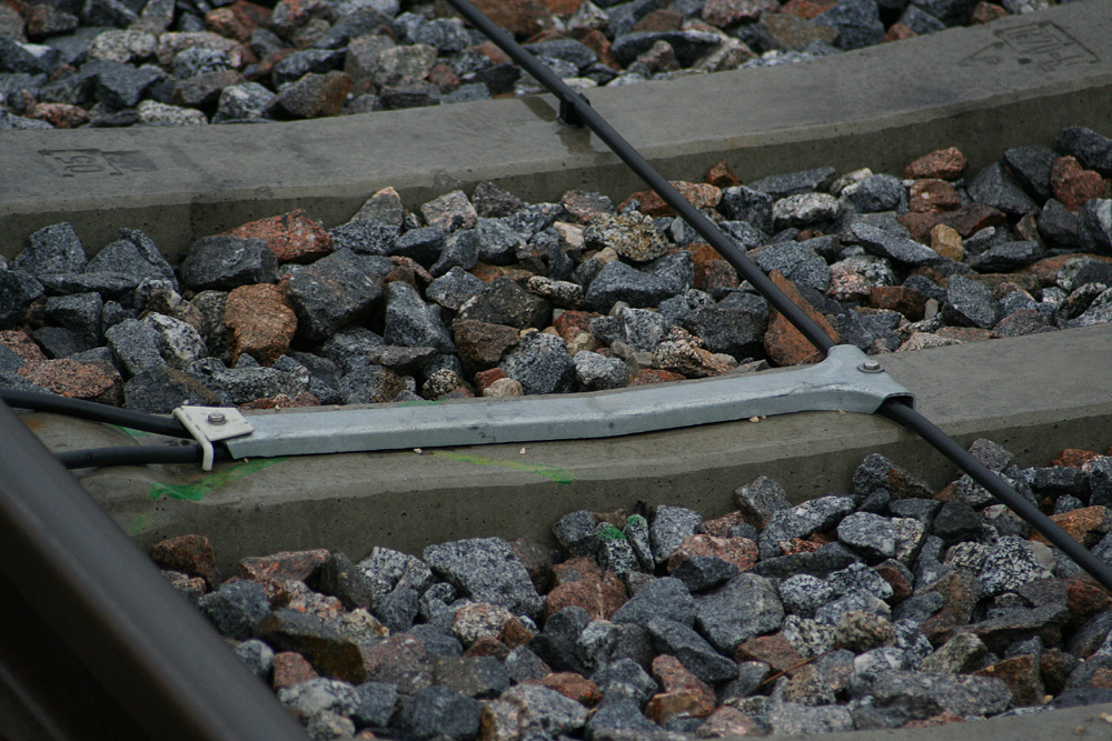 Kreuzung zwischen zwei LZB-Kabeln